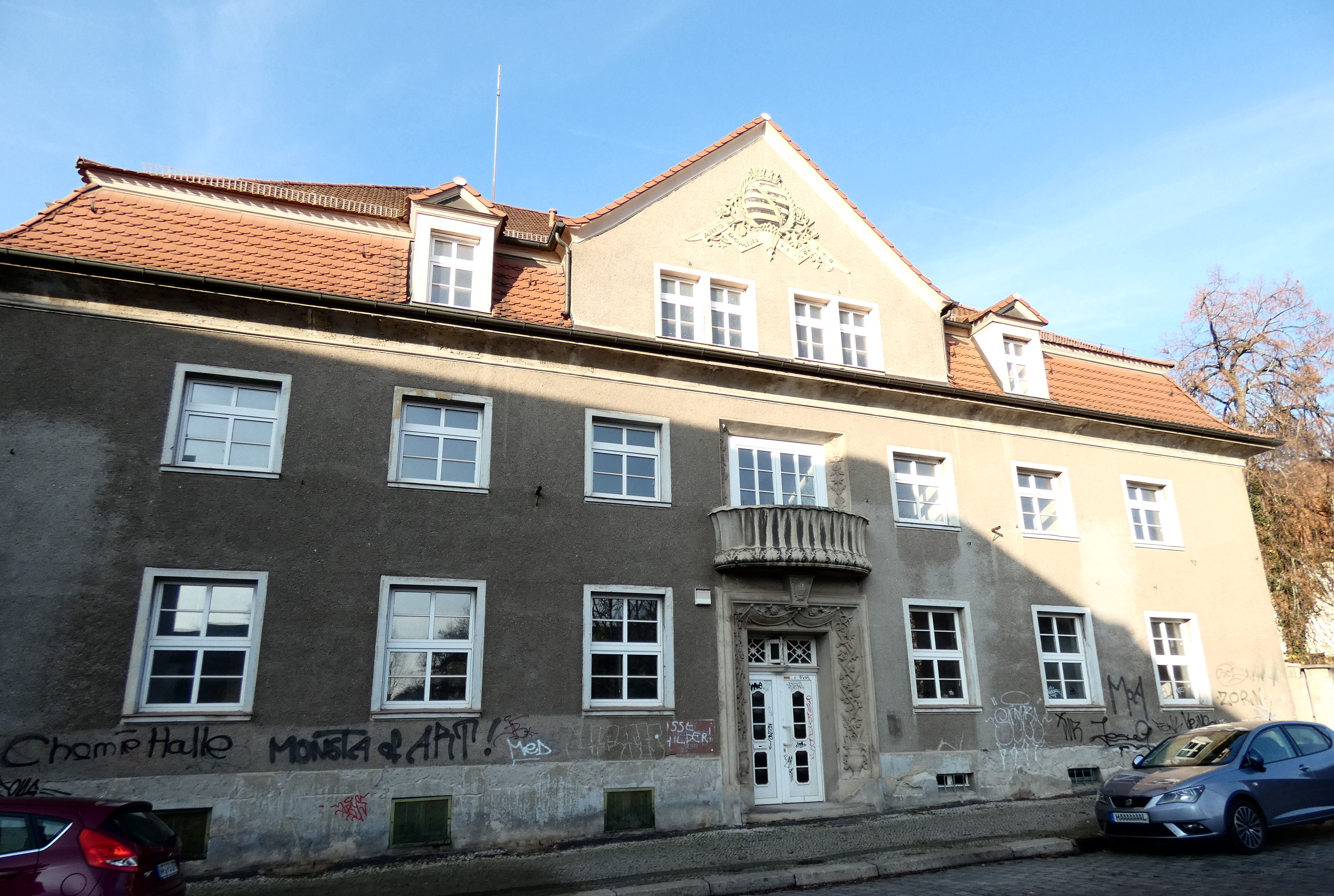 Heinrich-Zille-Straße 1, Halle (Saale)